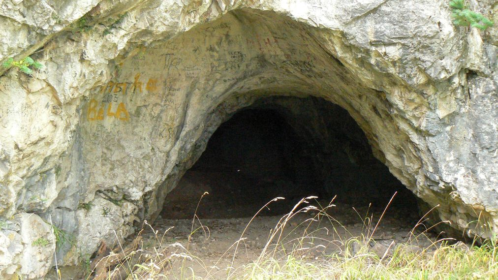 14 m dlhá Oltárna diera v Hrhovskom amfiteátri slúžila podobne ako niektoré ďalšie tunajšie jaskyne ako úkryt pred Tatármi v 13. storočí n. l. Vstupný, do oblúka klenutý portál je priam posiaty historickými i novodobými nápismi. Jaskyňa má korózny pôvod.